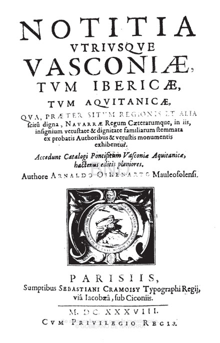 Arnault Oihenartek idatzitako Notitia utriusque Vasconiae, tum Ibericae, tum Aquitanicae liburuaren lehen edizioaren (1638) portada.